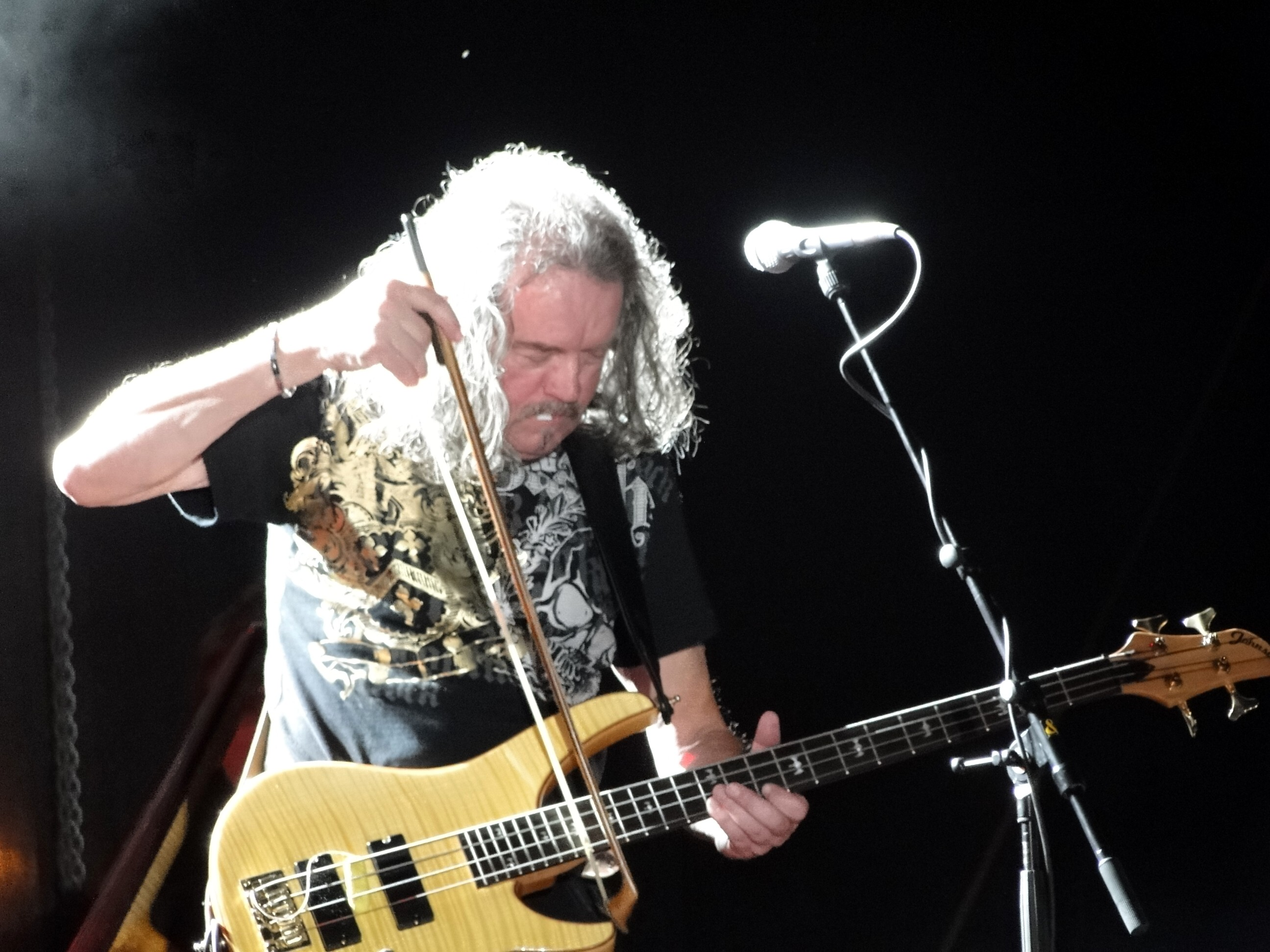 Wolfgang Riedel von der Band electra während eines Konzerts im August 2009